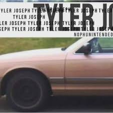 Il file rappresenta la copertina dell'album No Phun Intended del cantautore statuitense: Tyler Joseph